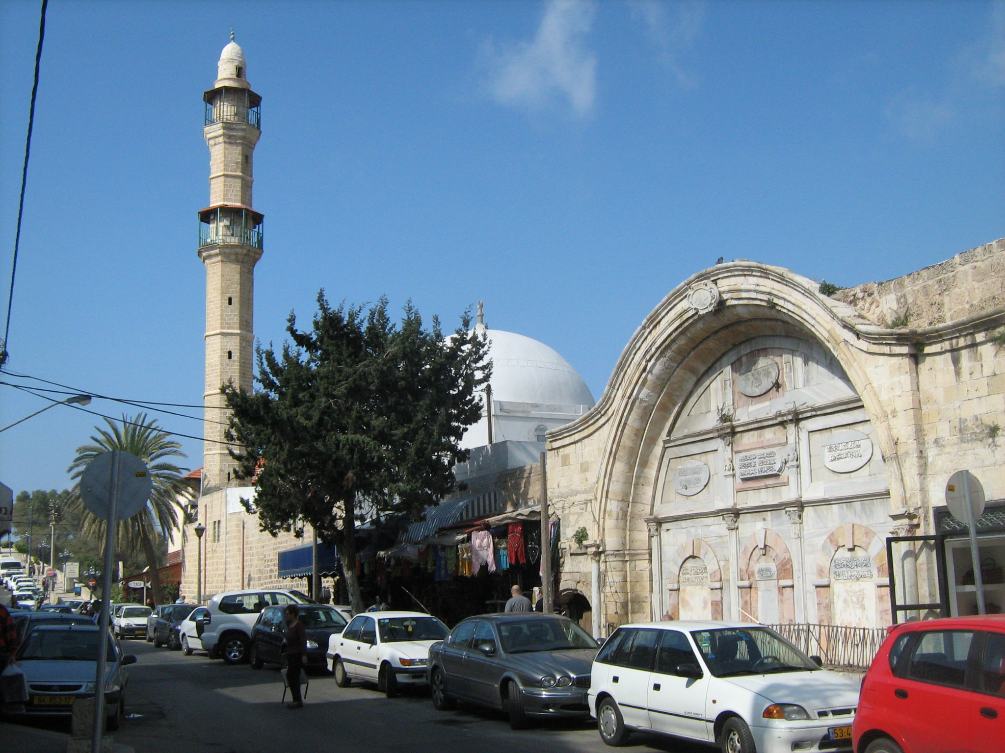 מסגד מחמודיה ביפו